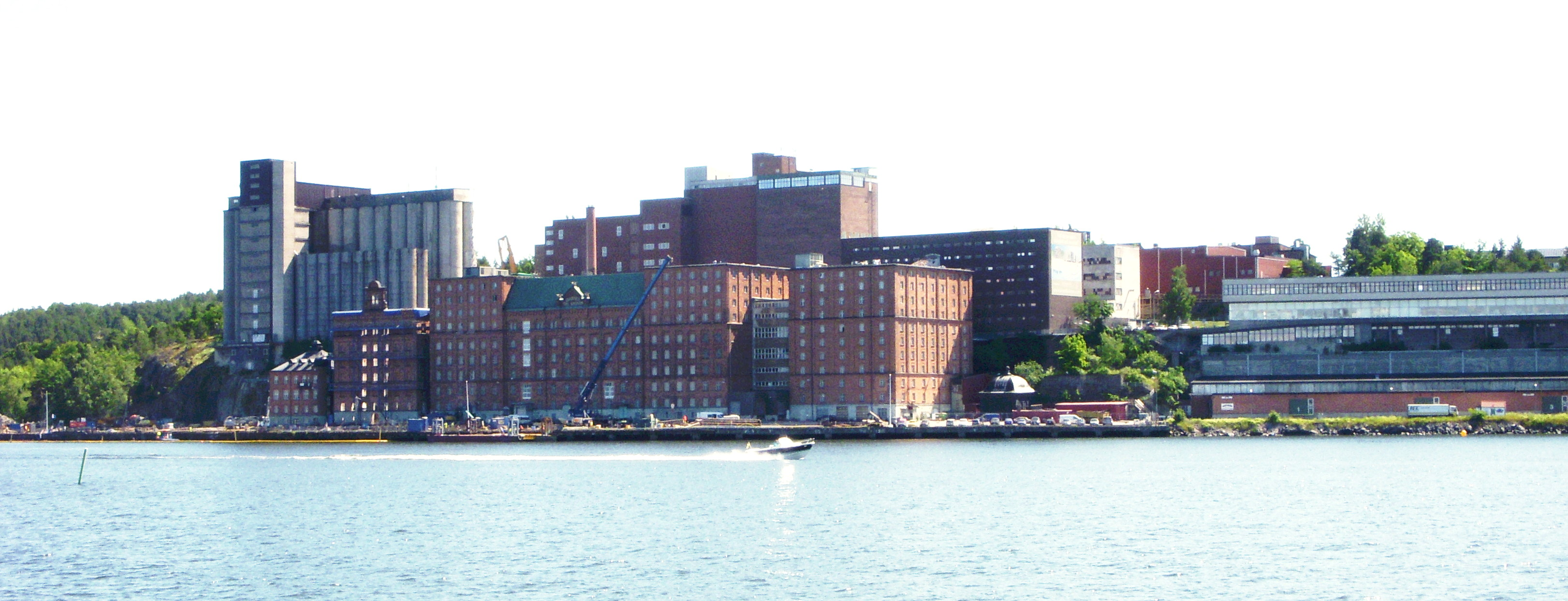 Östra delen av Kvarnholmen, Nacka